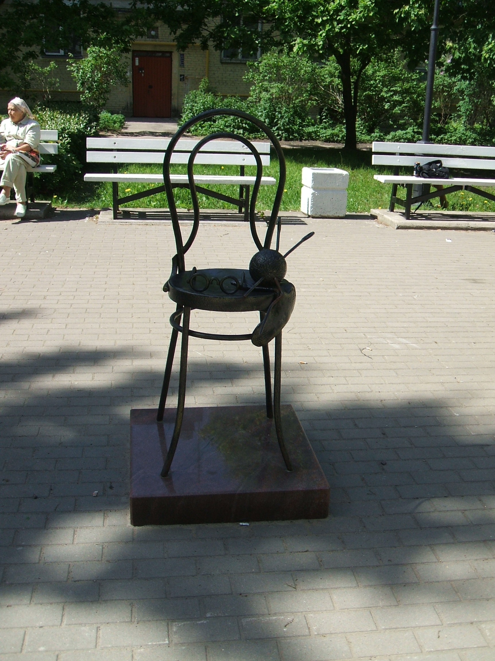 Малая архитектурная форма г.Зеленогорска СПб